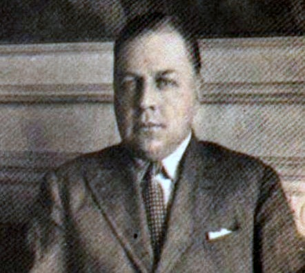 Imagen del general Mosconi en servicio